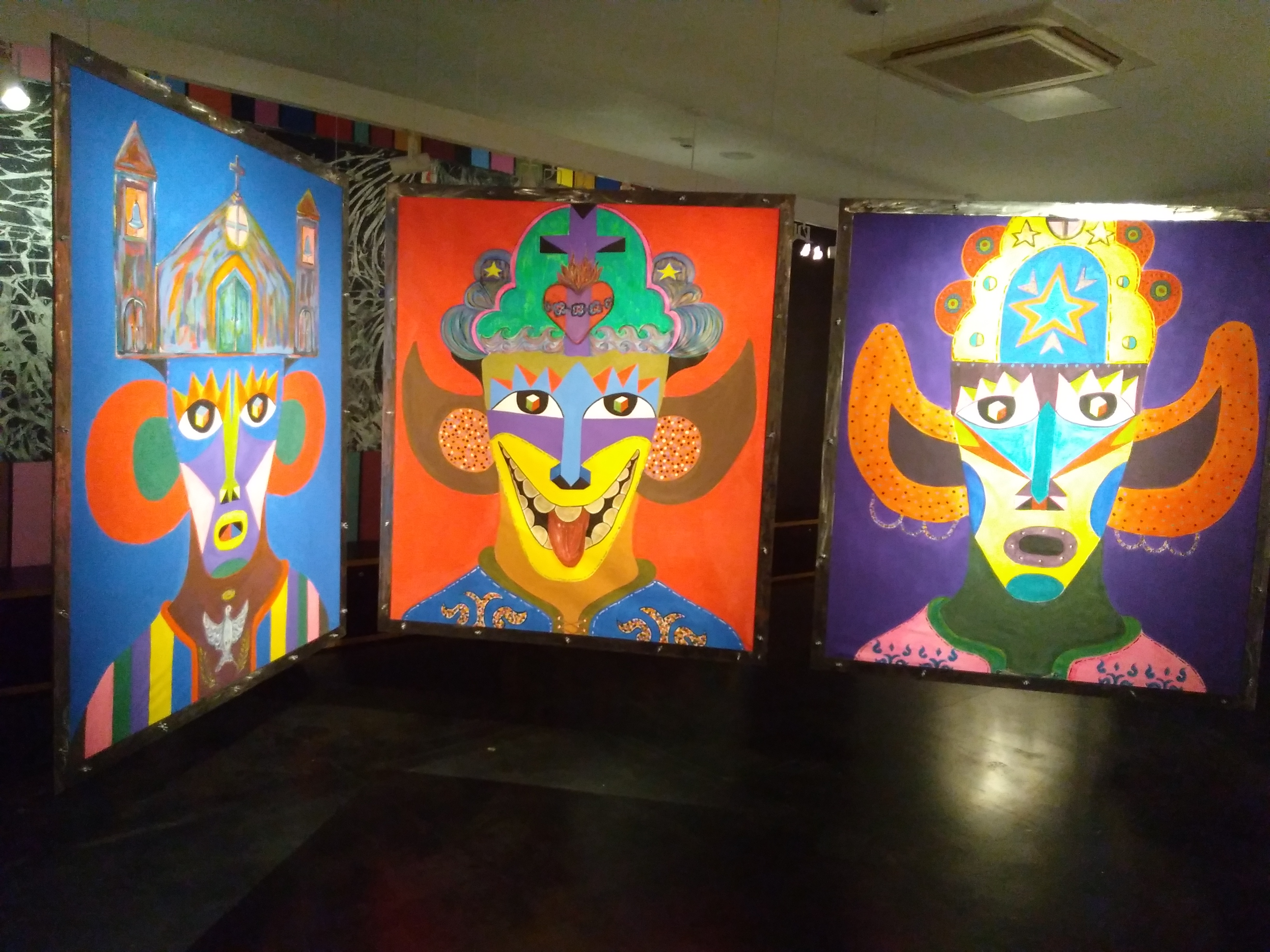 Áreas externa e interna do Centro Cultural VALE Maranhão, contendo exposição, espaço cultural instalado no Centro Histórico da cidade de São Luís, MA